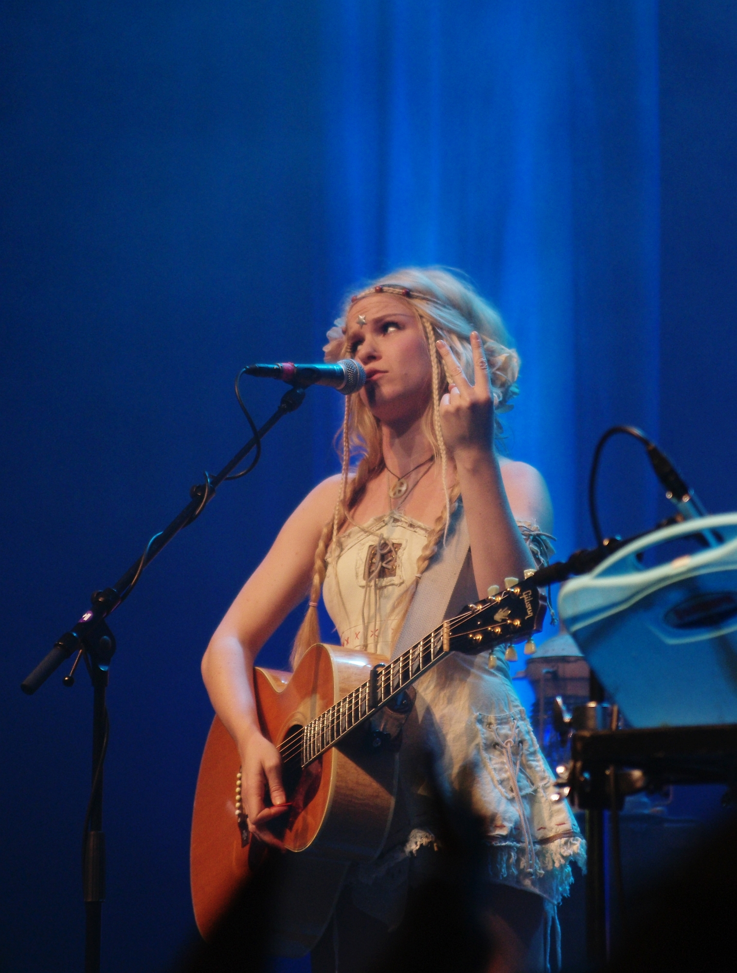 Katzenjammer, at metropool Hengelo, NL. Solveig Heilo